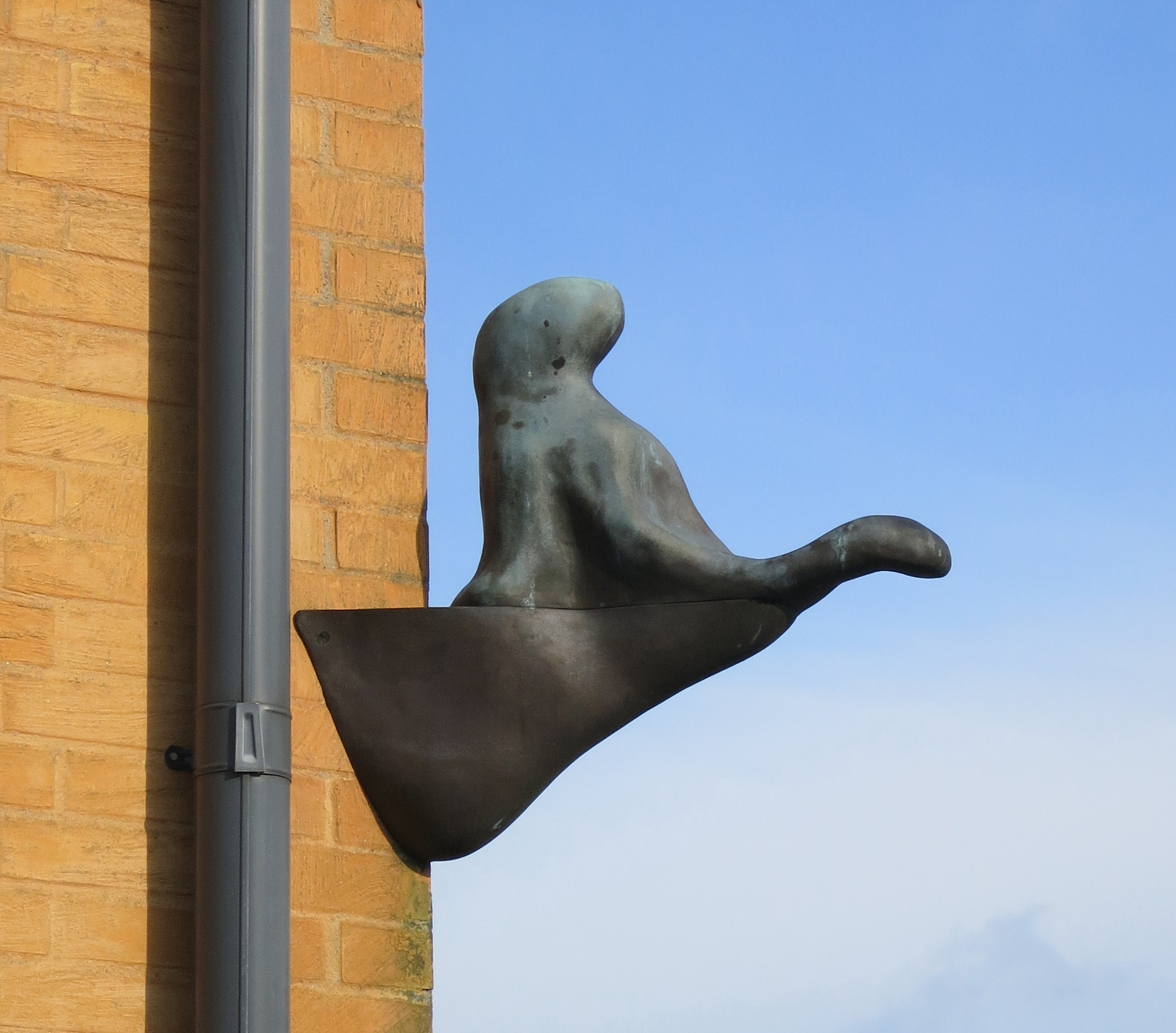 Spejare av Annika Svenbro, skulptur i Malmö